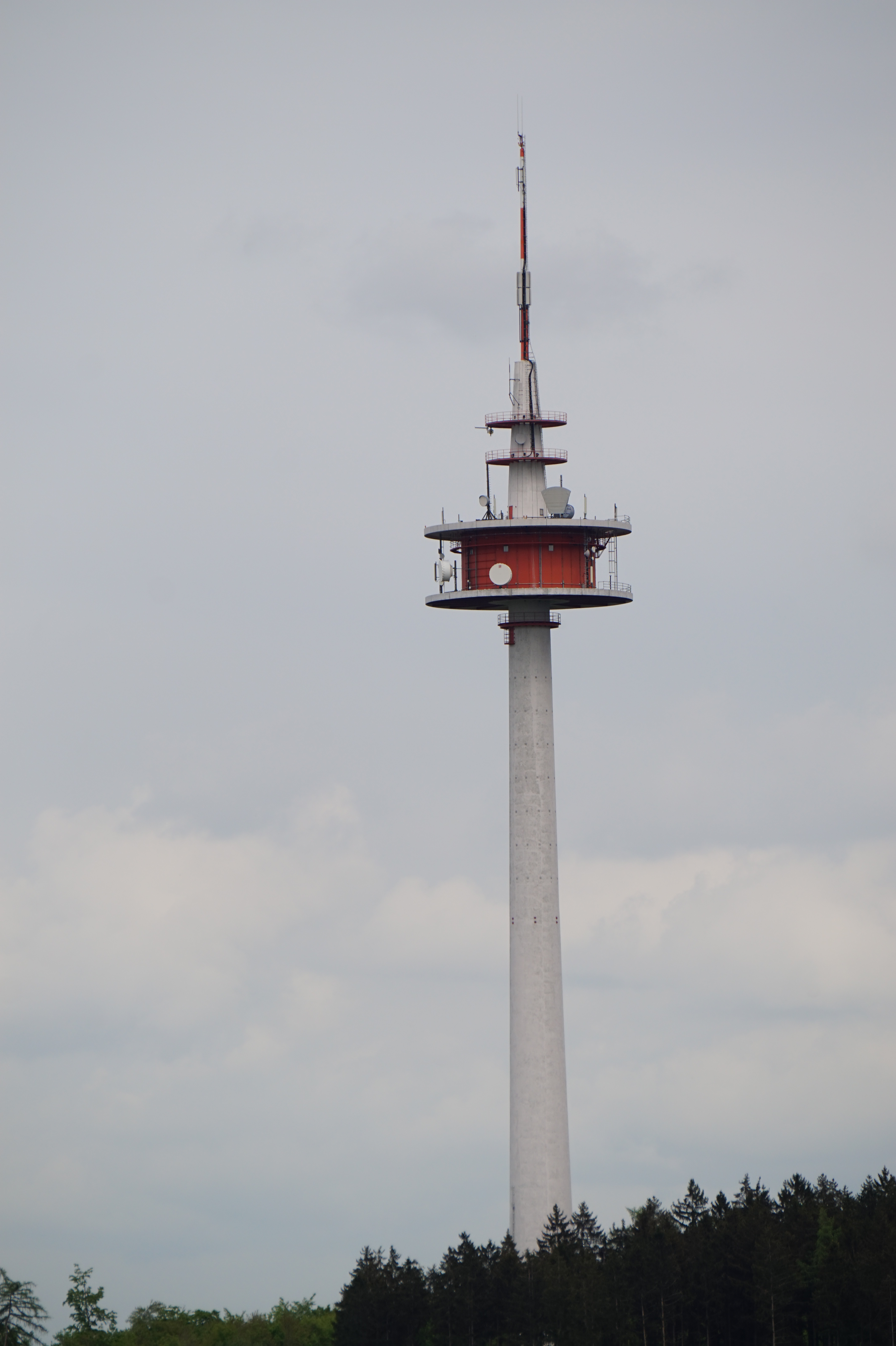 Aufnahme des Fernmeldeturm bei Indernbuch von Westen aus.